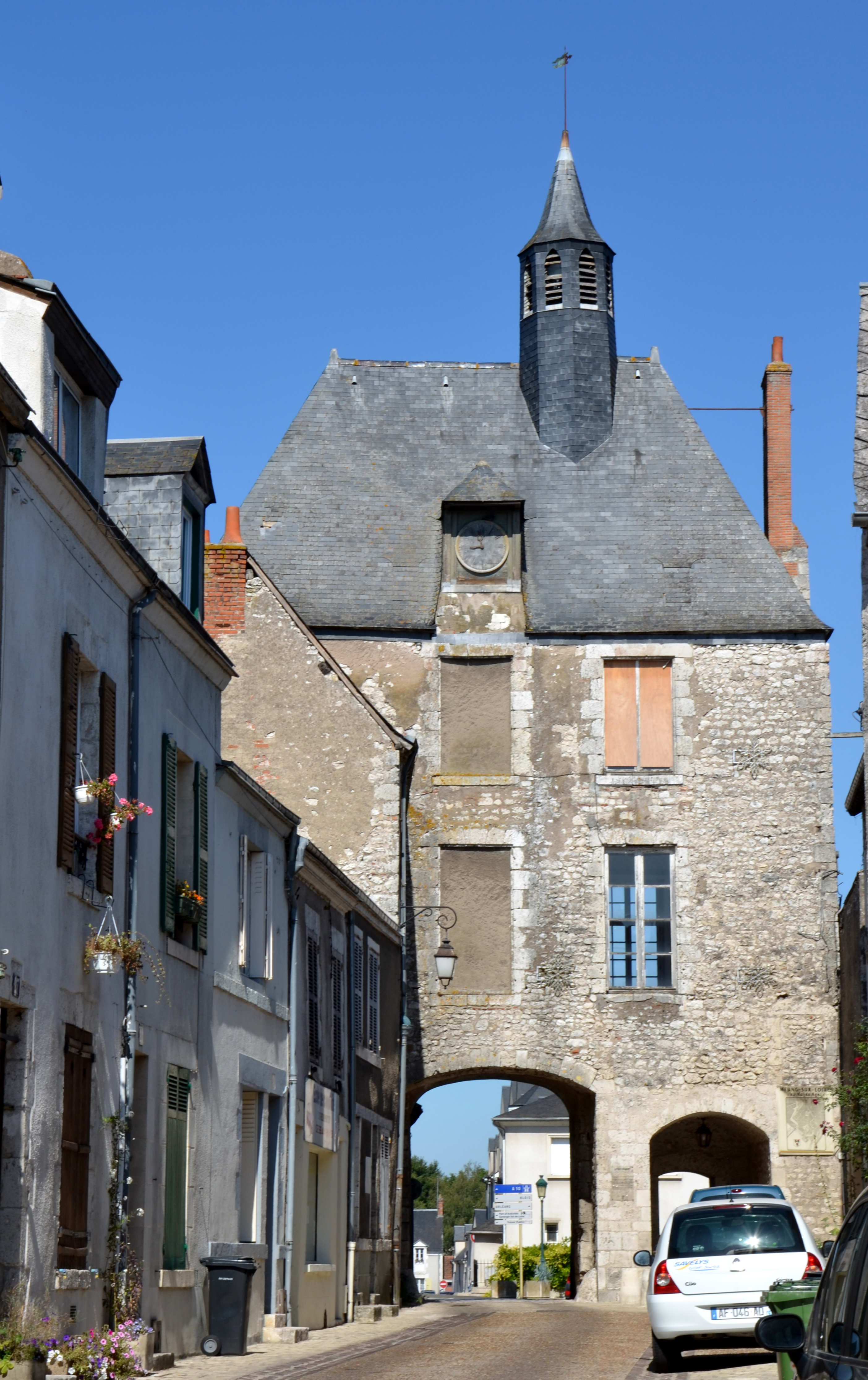 porte d'Amont Meung-sur-Loire , Loiret, France